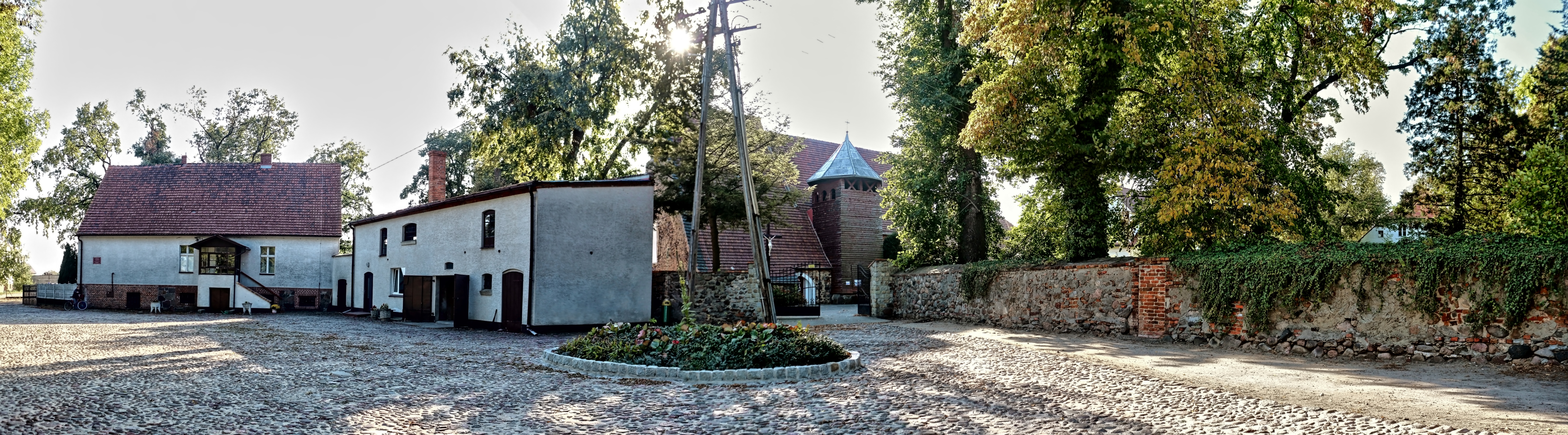 Osowa Sień, plebania i kościół